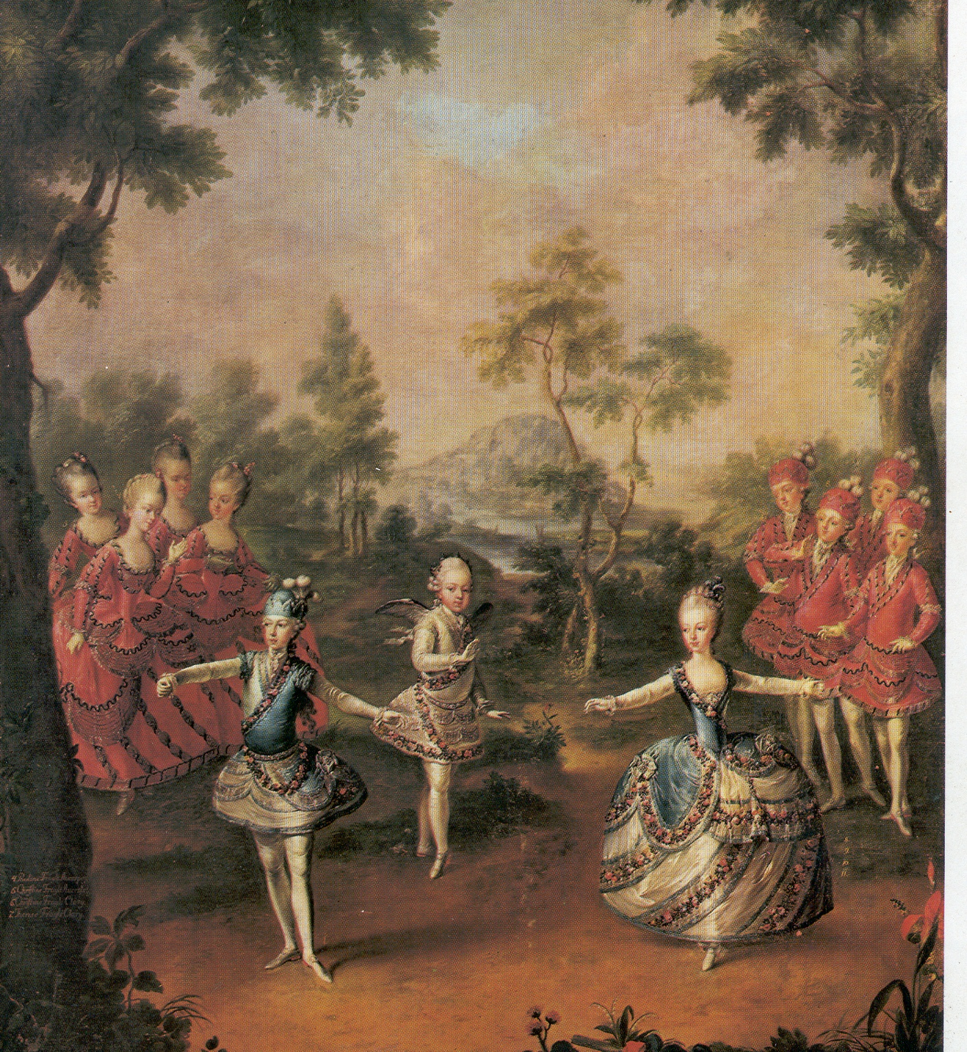 Geen rechten meer wegens ouderdom, eigen bewerking- De kinderen van Keizerin Maria Thersia dansen een ballet; 18de eeuw oostenrijk